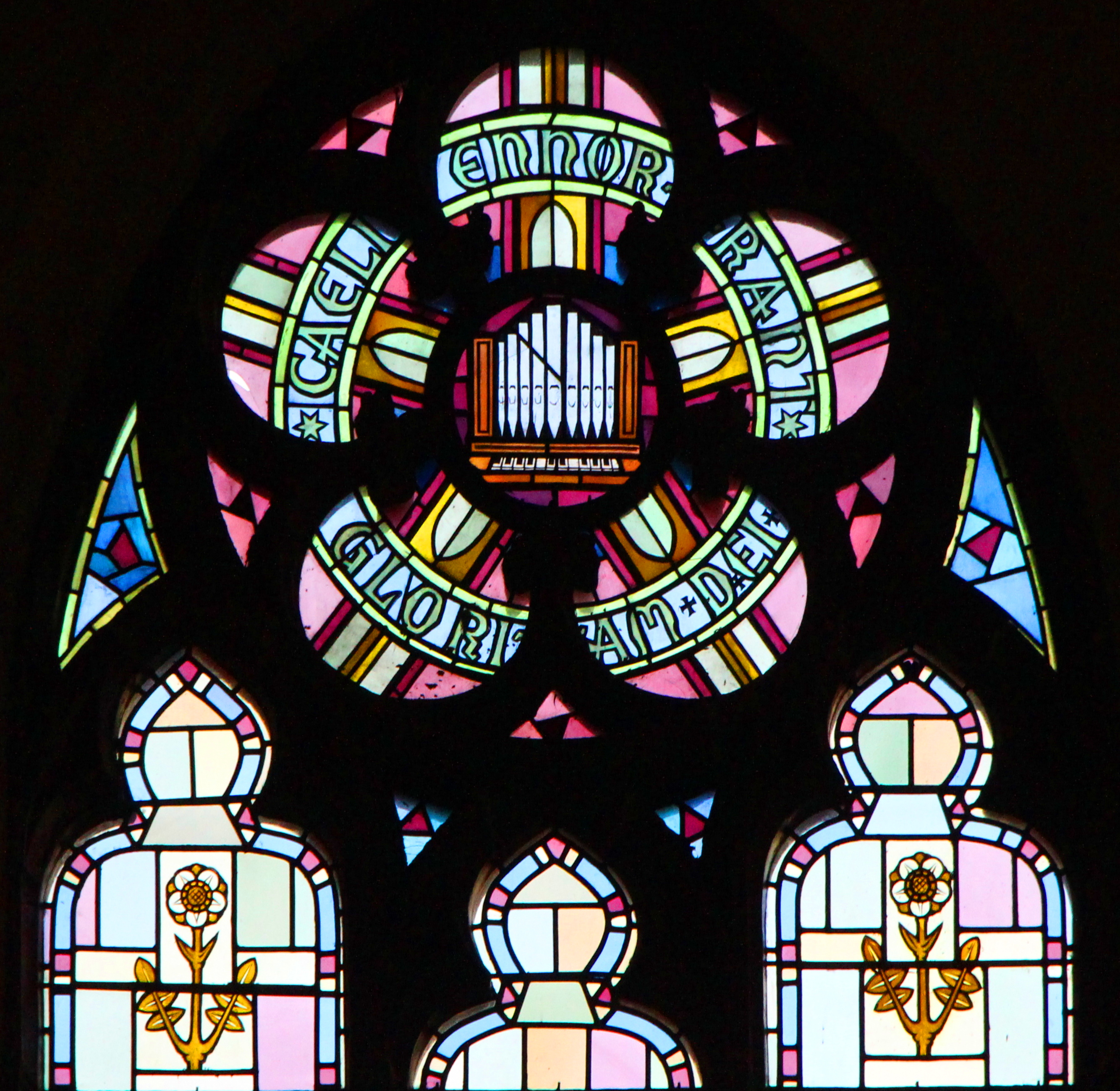 Kirchenfenster in der Marienkirche Kaiserslautern; die Inschrift ist eine Falschschreibung von CAELI ENARRANT GLORIAM DEI - Psalm 18:2 (Vulgata) / Psalm 19:2 (EÜ)